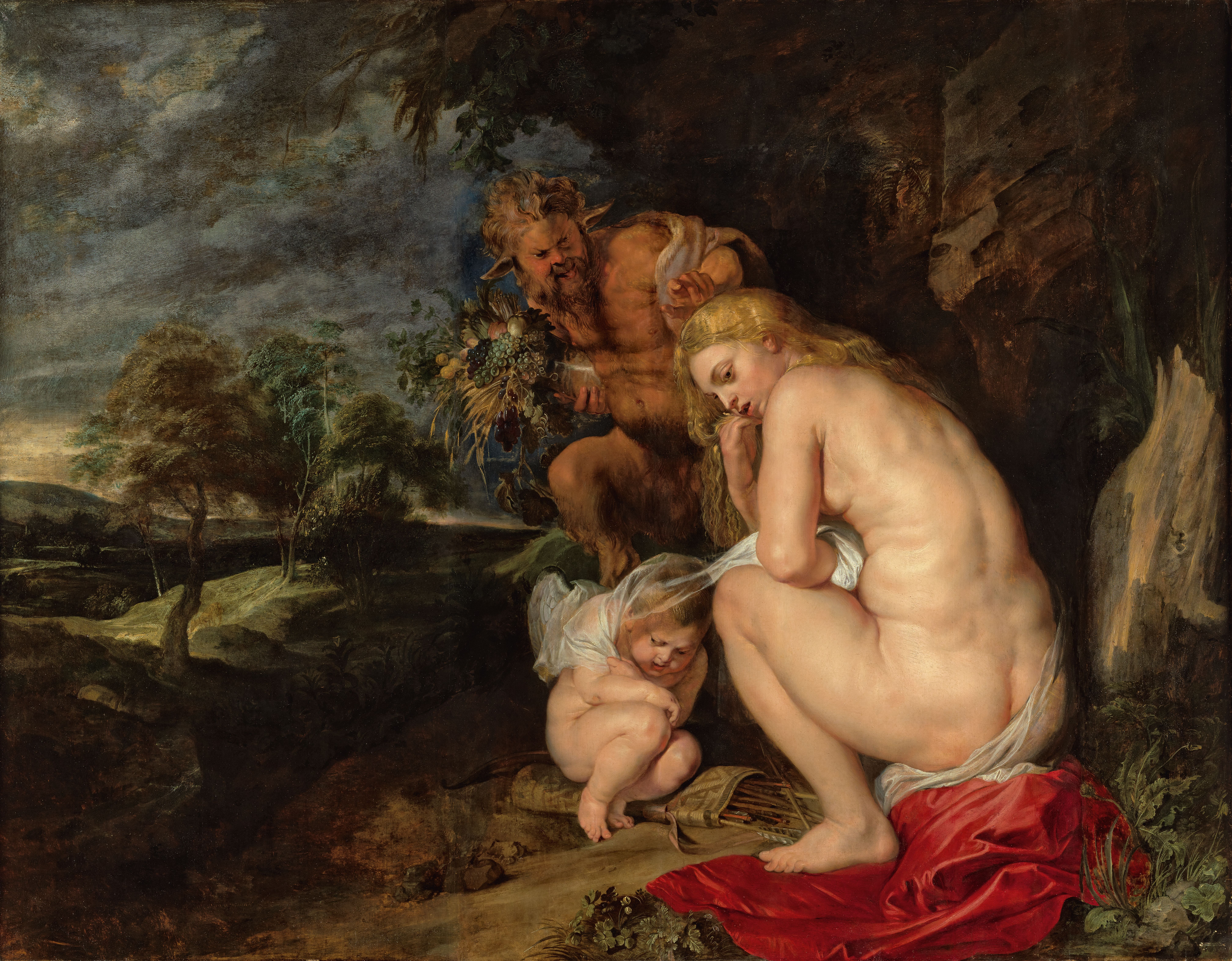 schilderij ( Peter Paul Rubens( koninklijk museum voor schone kunsten antwerpen